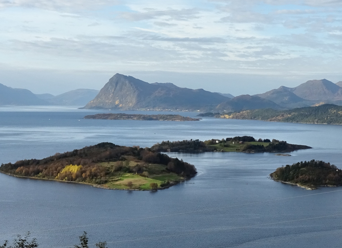 Raudøya ytst i Ørstafjorden på Sunnmøre